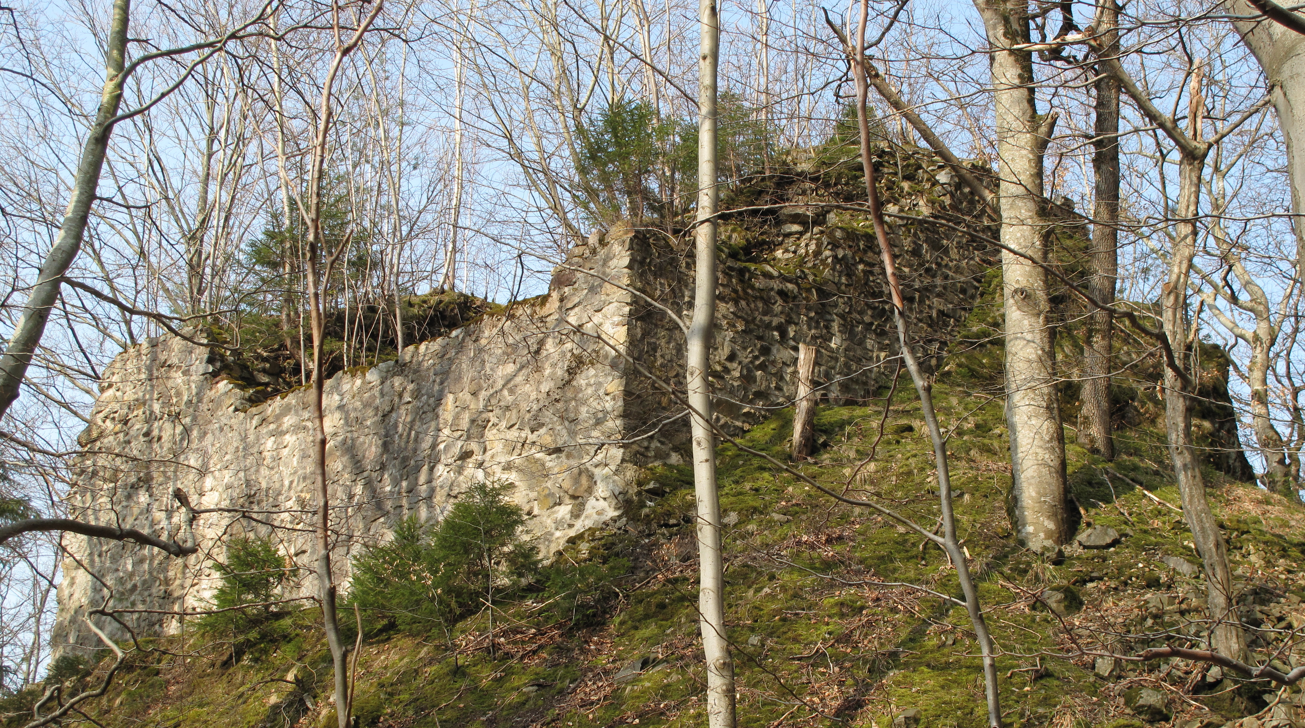 Ruine Bubenstein